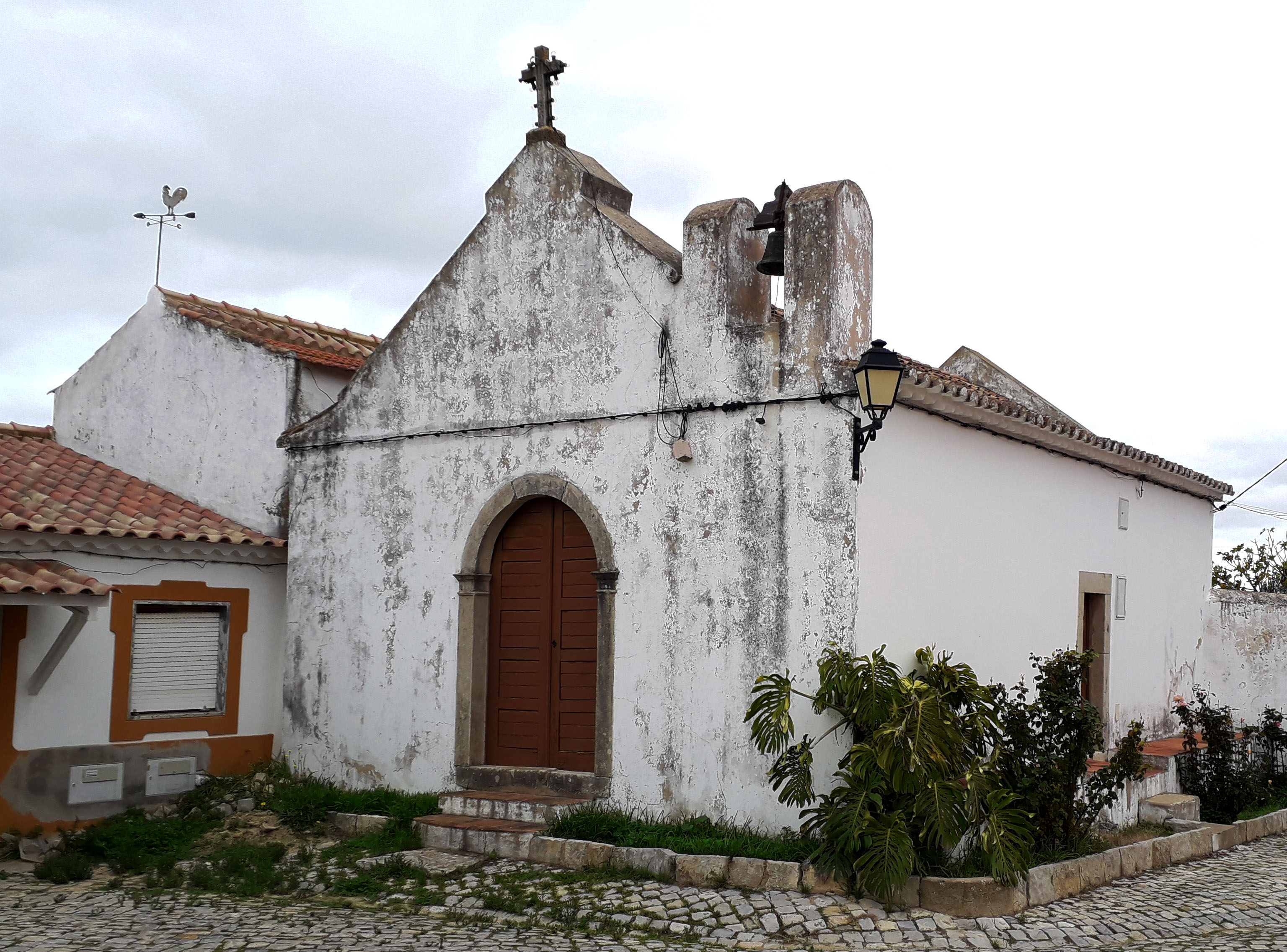 Ermida de S. Sebastião de Algoz, concelho de Silves, distrito de Faro. Dezembro de 2019